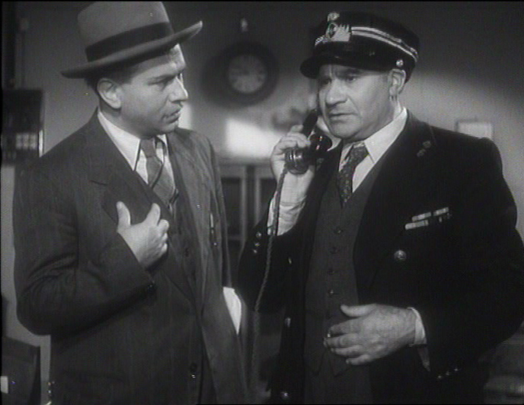 Screenshot del film Quattro passi fra le nuvole (1942) di Alessandro Blasetti.